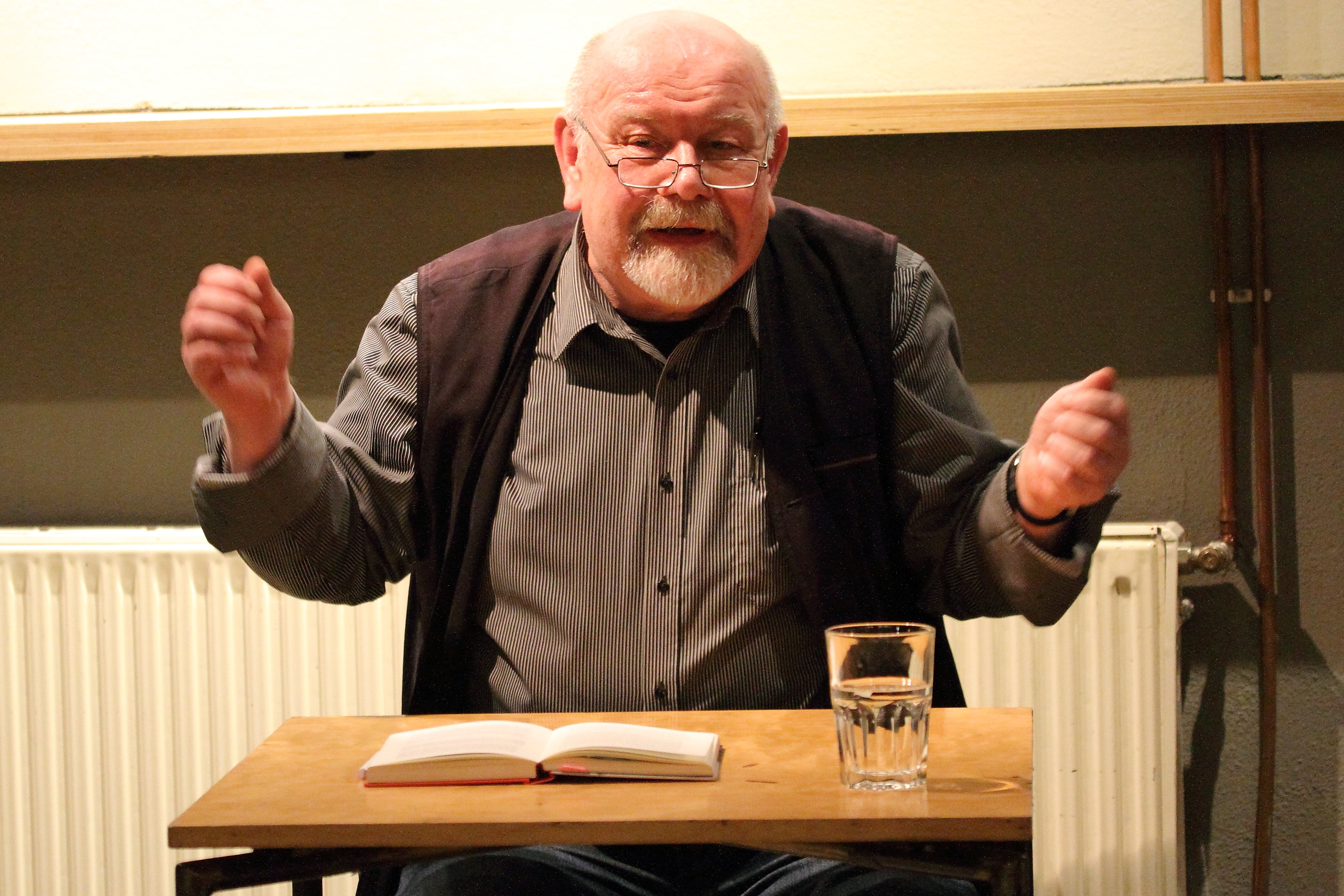 Ludwig Lugmeier erzählt und liest im Club W71 aus einem Faktenroman Die Leben des Käpt´n Bilbo.